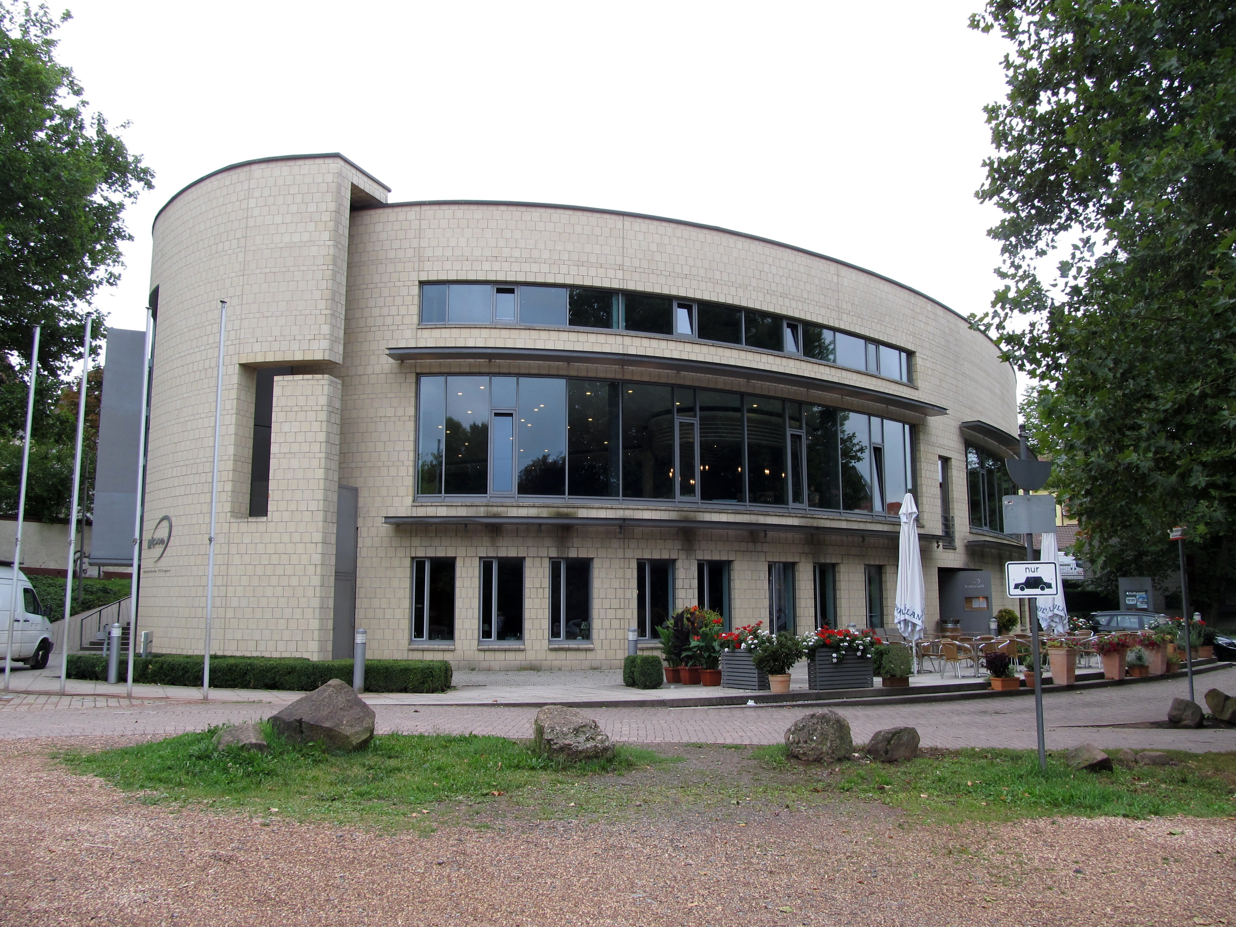 "Illipse", Kulturforum Illingem in Illingen, Saarland